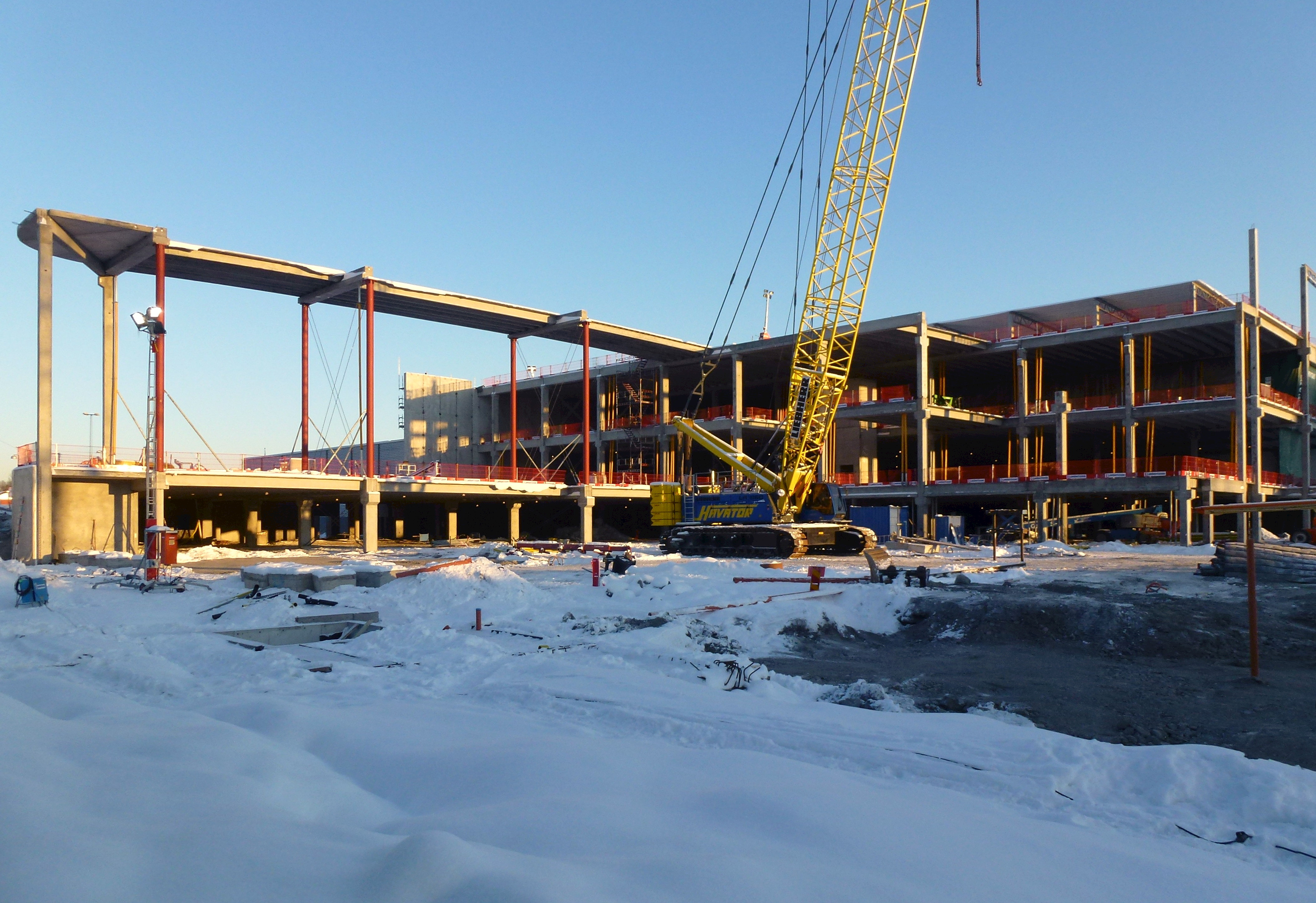 Kungens kurva utbyggnad, prefabstomme från Strängbetong